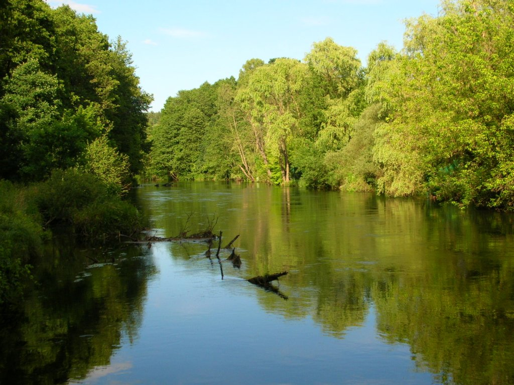 Brda w Bydgoszczy - Opławiec